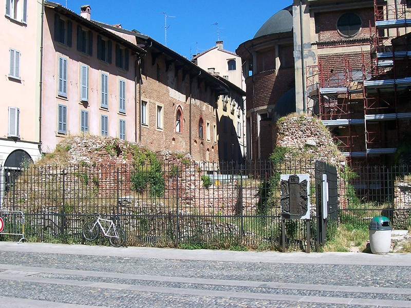 Pavia - Resti della Torre Civica crollata nel 1989